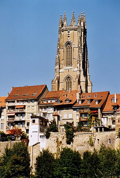 Das Münster von Freiburg/Fribourg